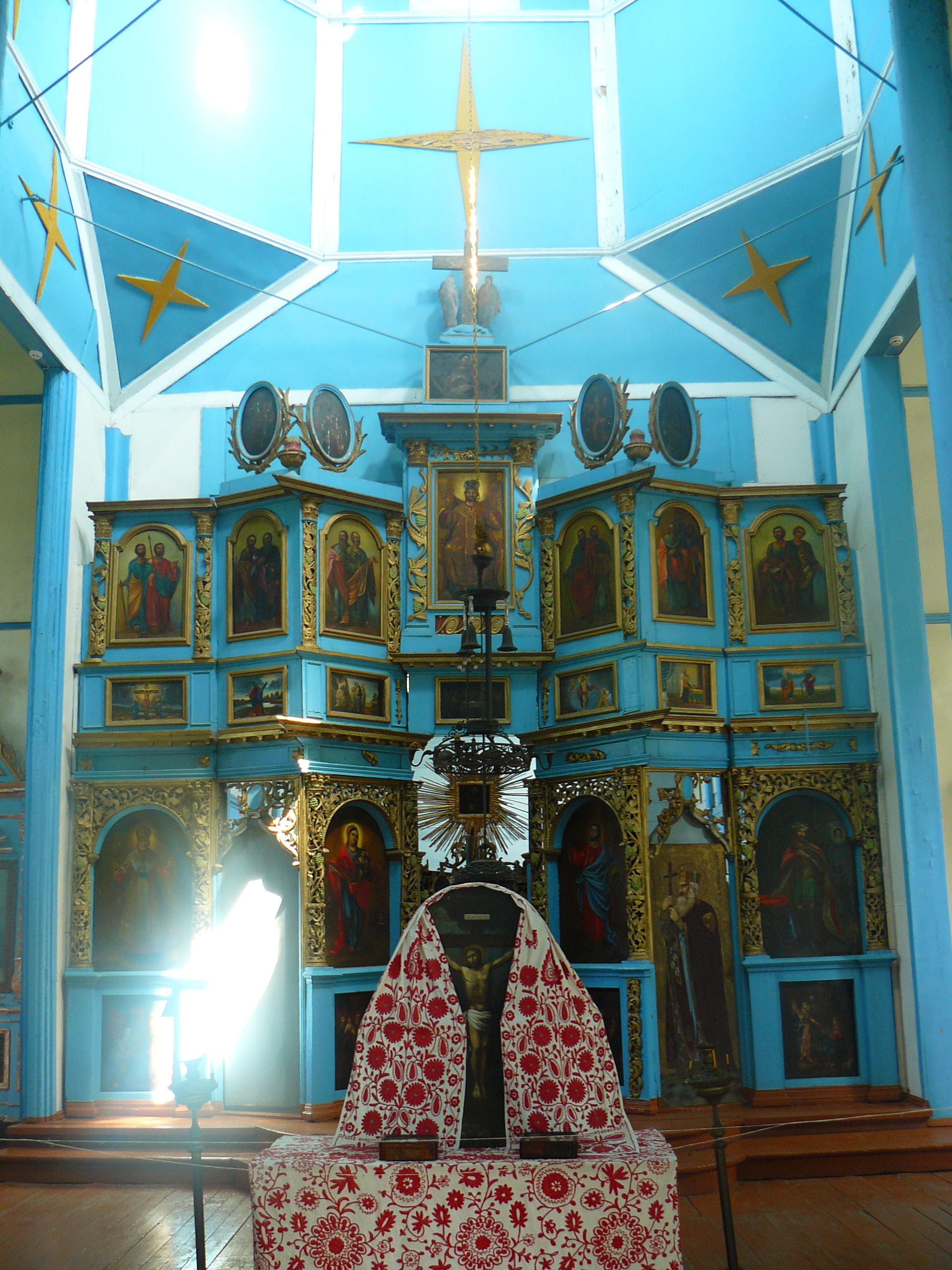 Церква святого Георгія, Переяслав-Хмельницький, вул. Літописна, 2